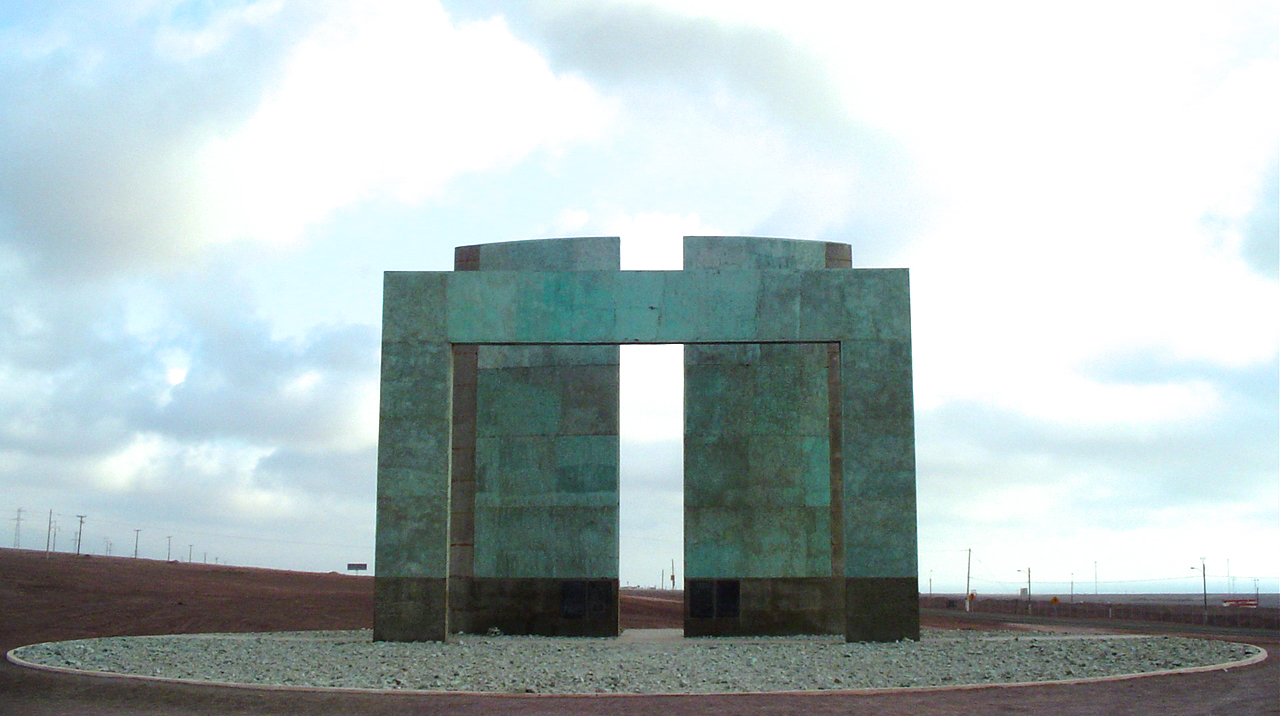 Hito al Trópico de Capricornio.